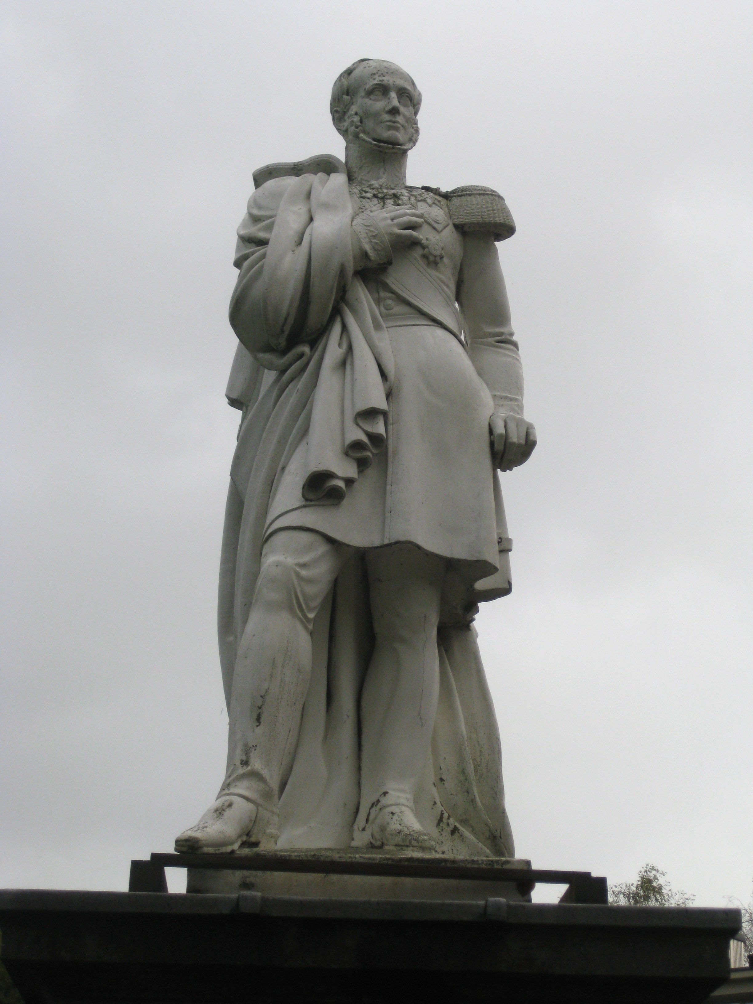 standbeeld van koning Willem II uit 1865. In 1882 geplaatst op het landgoed Bronbeek. Kunstenaar Wilhelm Hornberger.